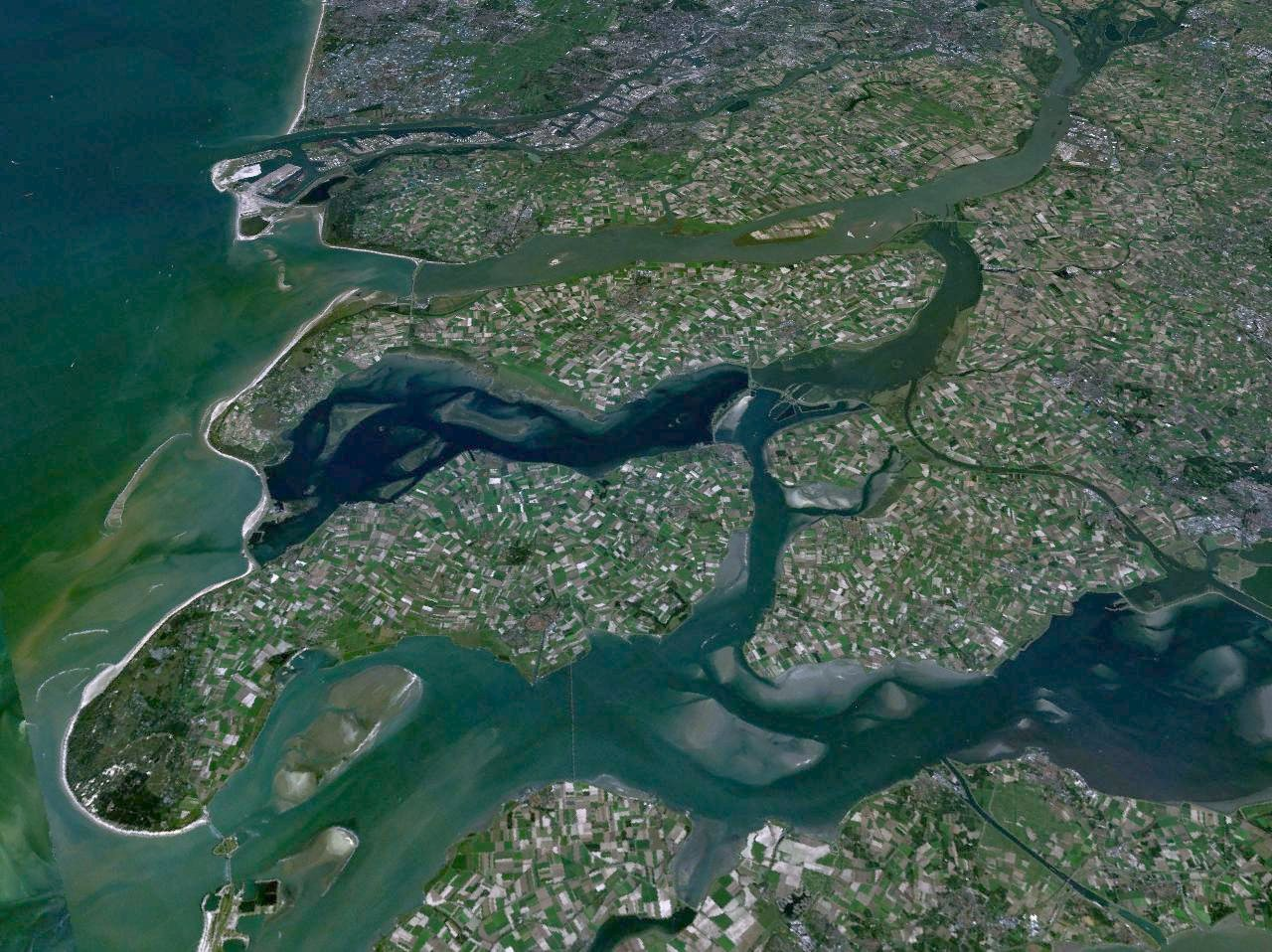 Provincie Zeeland, satellietfoto. Kopie van commons, bewerkt (gamma).